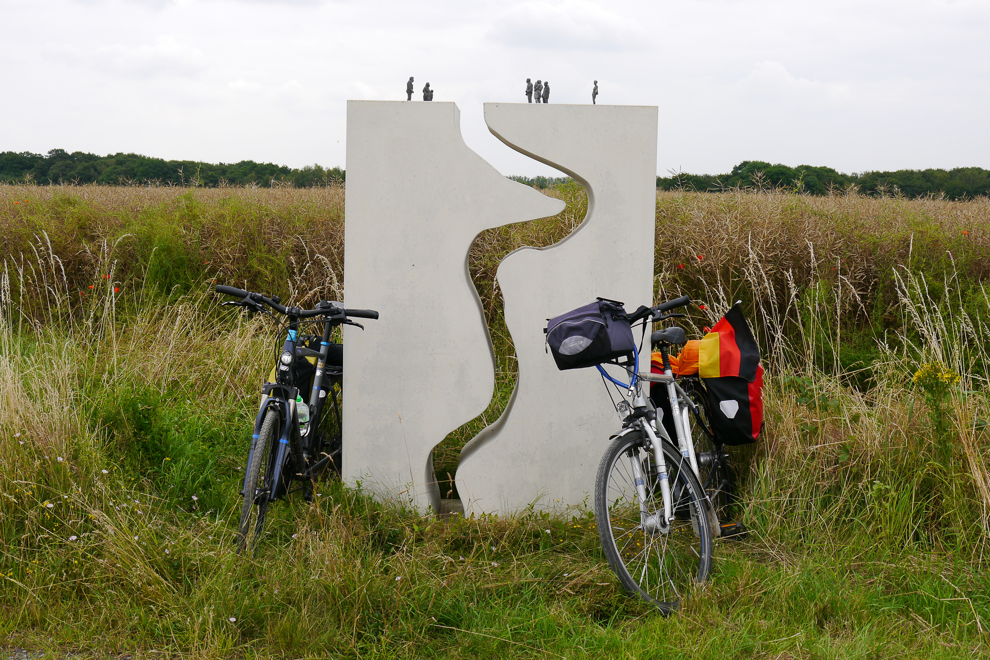 Kunst am Grünen Band zwischen Goslar-Vienenburg/Wiedelah (Niedersachsen) und Osterwieck-Suderode (Sachsen-Anhalt) auf der Strecke zwischen Wiedelah und Suderode. – Die Kunstinstallation „Begegnung“ entstand 2010 im Rahmen eines Kunstwettbewerbs. Künstler: Detlef Kiep, Nicole Mentner und Anna Kölle. Das Denkmal liegt direkt am Radweg „Grünes Band Deutschland“, der ehemaligen innerdeutschen Grenze. (Der zweite Teil des Denkmals, das fehlende Stück in der Mitte, befindet sich in Blickrichtung hinter dem Feld.)